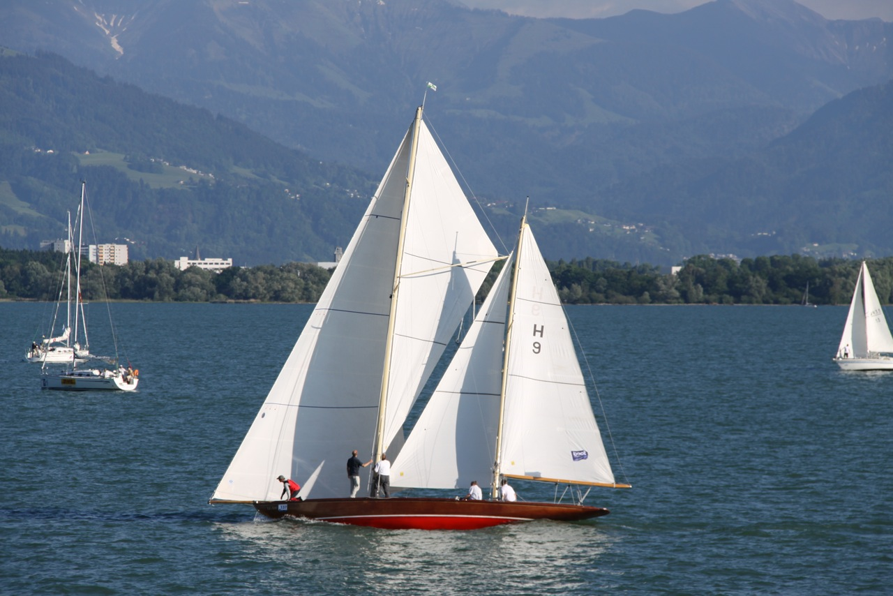 Rundum2010 - 8mR-Kreuzer "Elfe II"